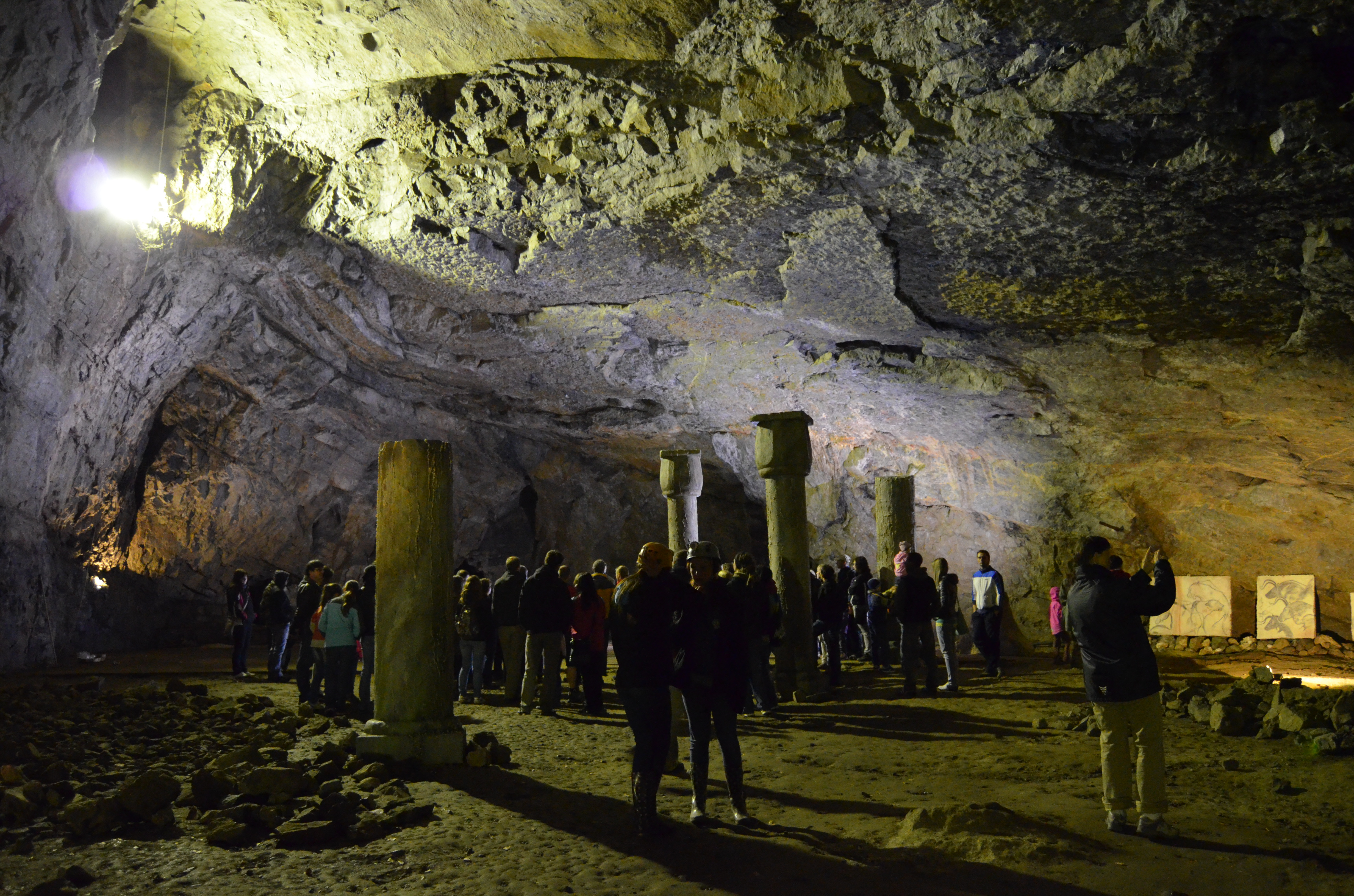 Býčí skála - Předsíň